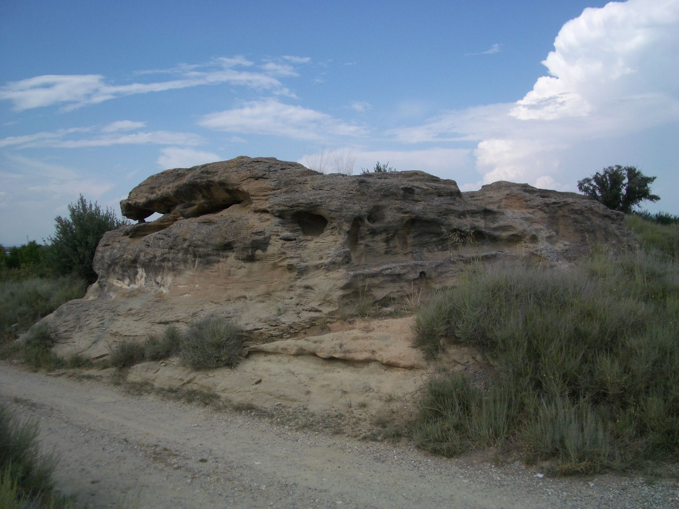 Vista sud de les restes.